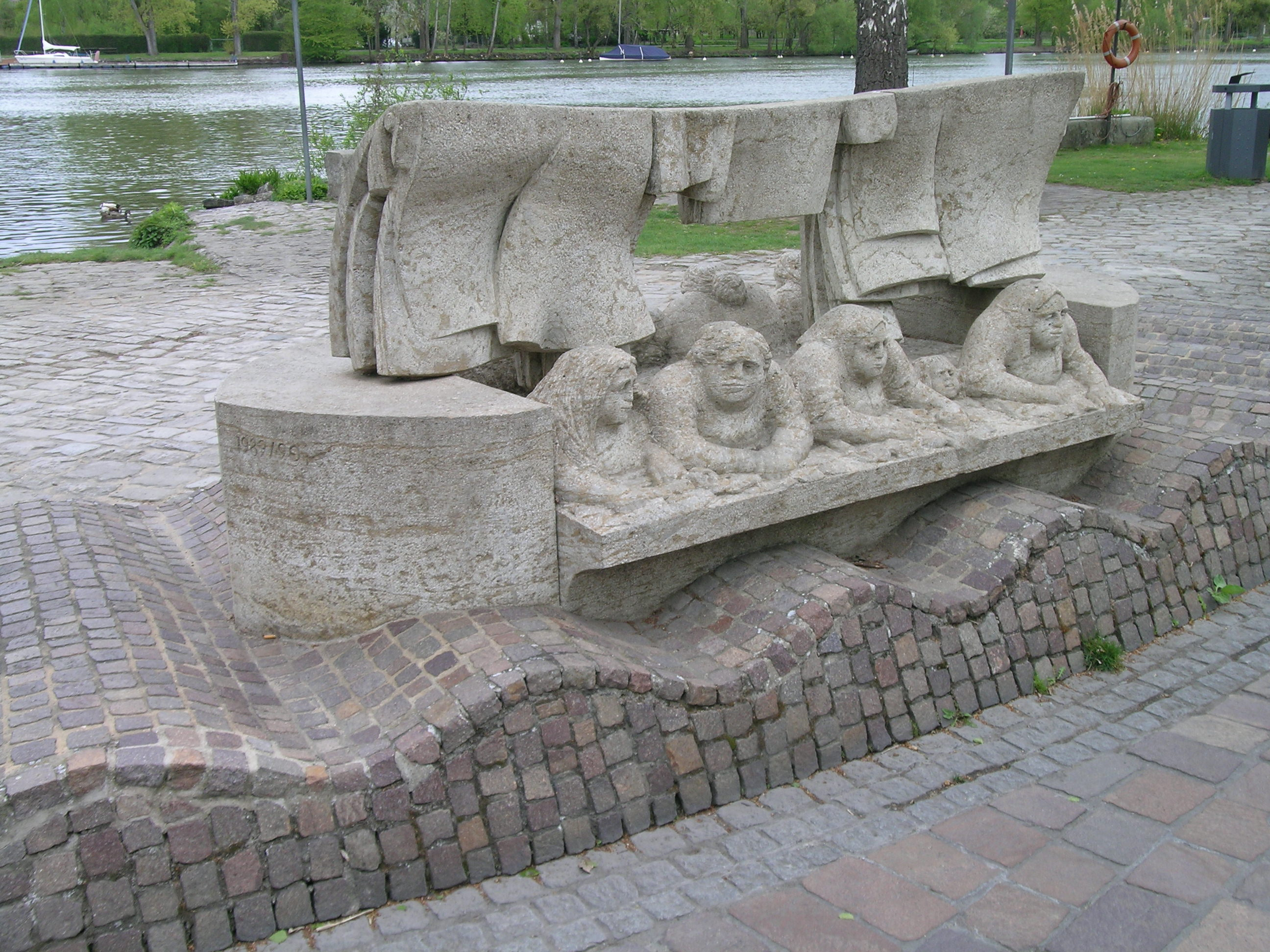 Veitshöchheim Skulptur eines Waschschiffs am Main (Untergrund stellt die Wellenbewegung des Wassers da)